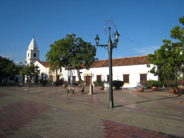 Image of Alfonso Lopez PLaza Valledupar, Colombia